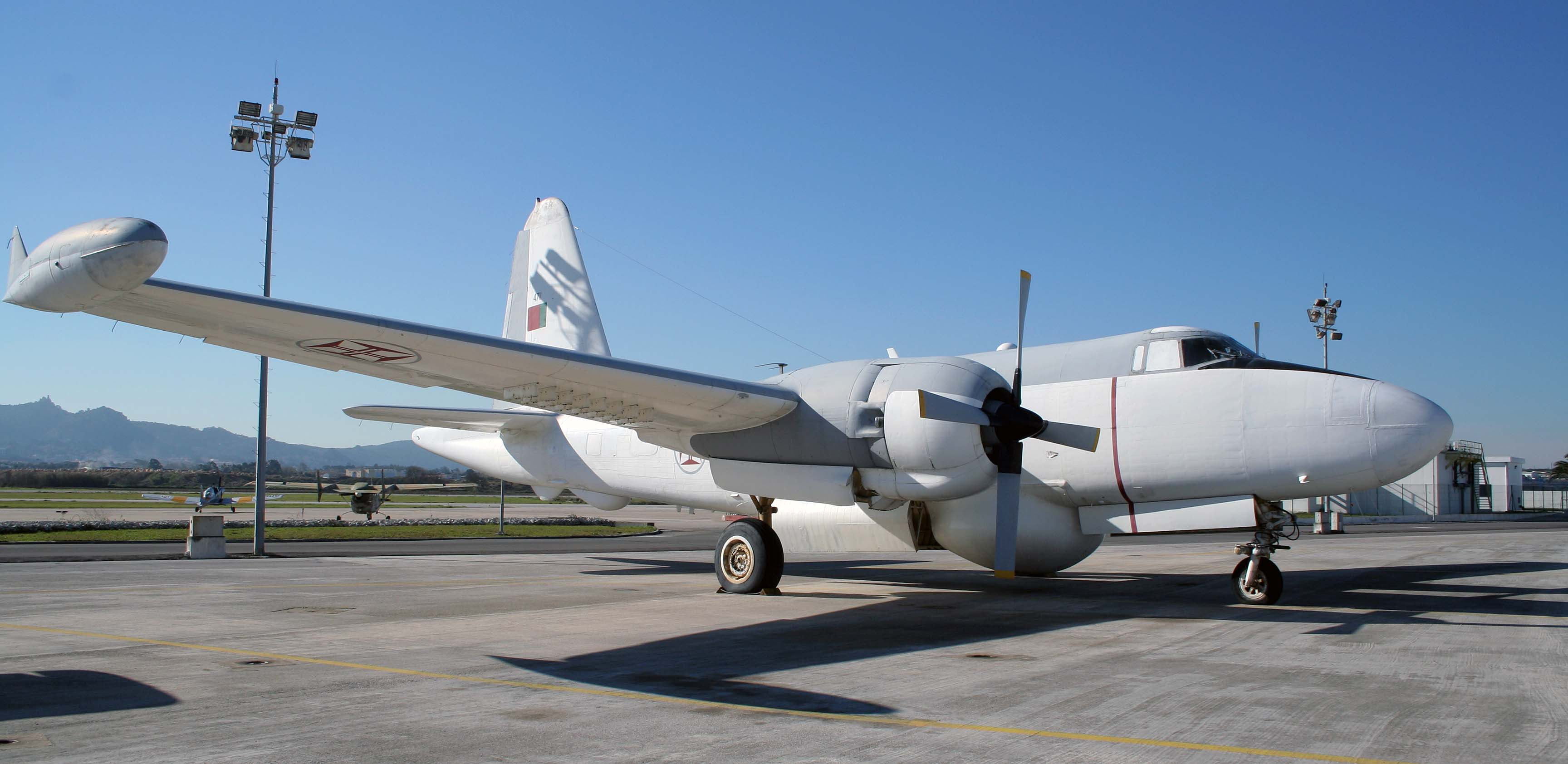 P2V-5 Neptune Portuguese Air Force Military Aircraft - Lockeed P2V-5 Neptune Source/Author Soares da Silva Portuguese Air Museum